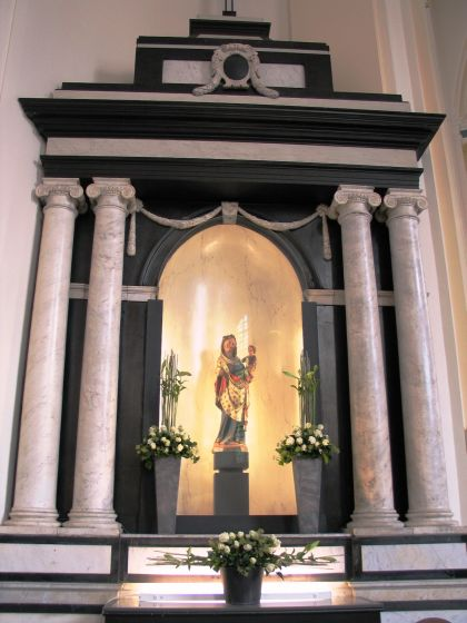 virga-jessebeeld - eigen foto